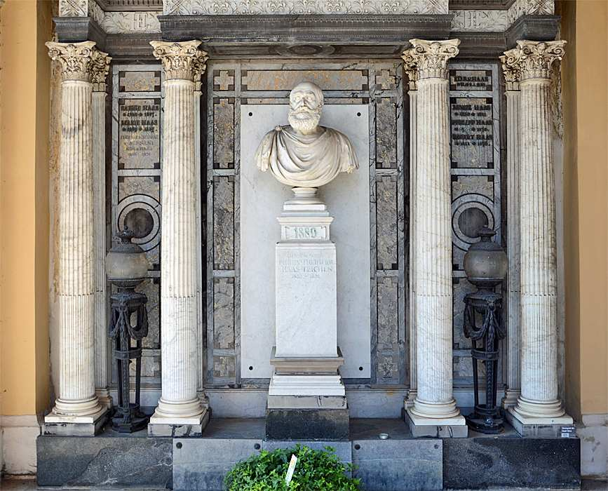 Granb von Philipp Haas von Teichen auf dem Zentralfriedhof Wien